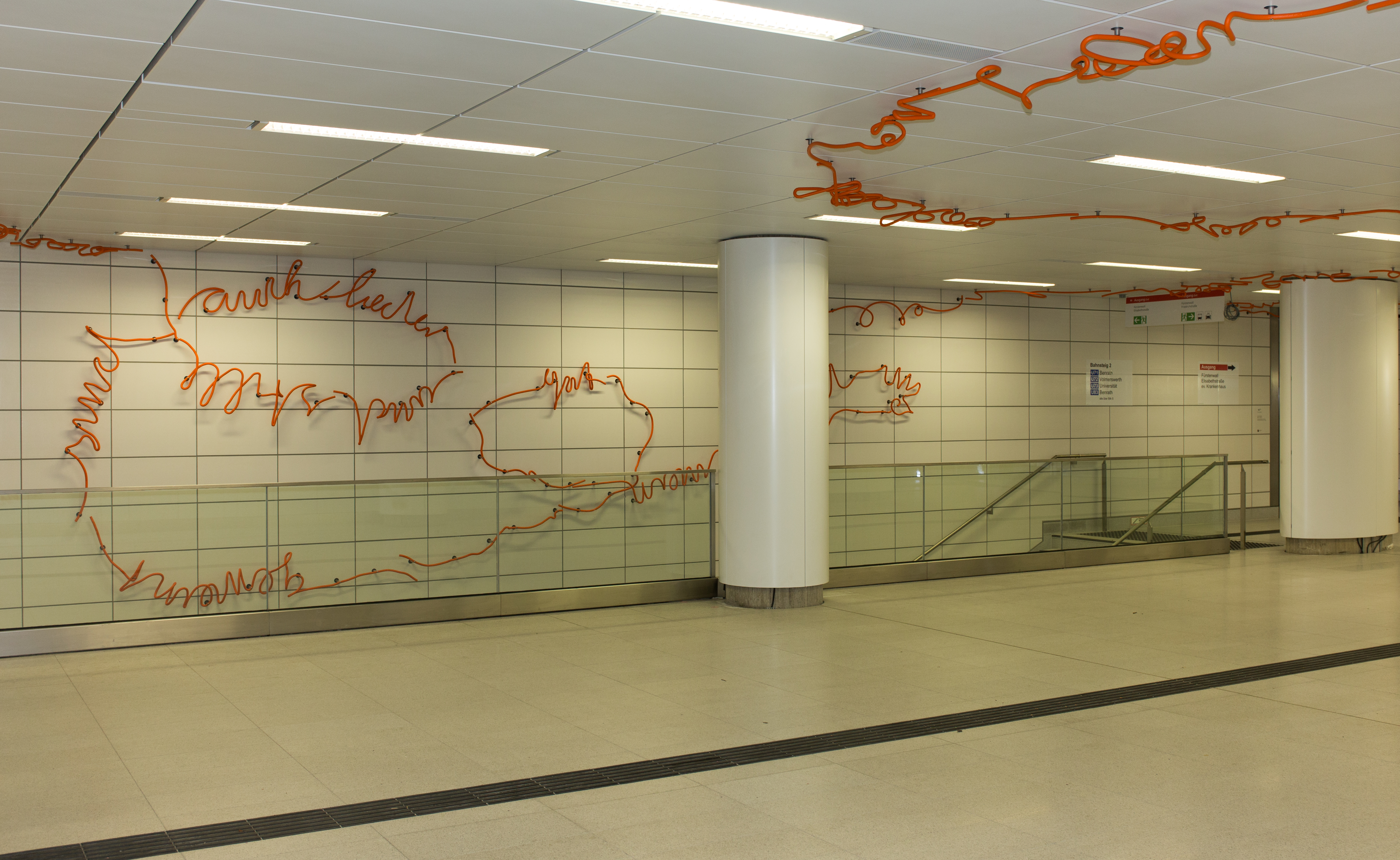 Wehrhahnlinie, Zwischengeschoss, U-Bahnhof Kirchplatz